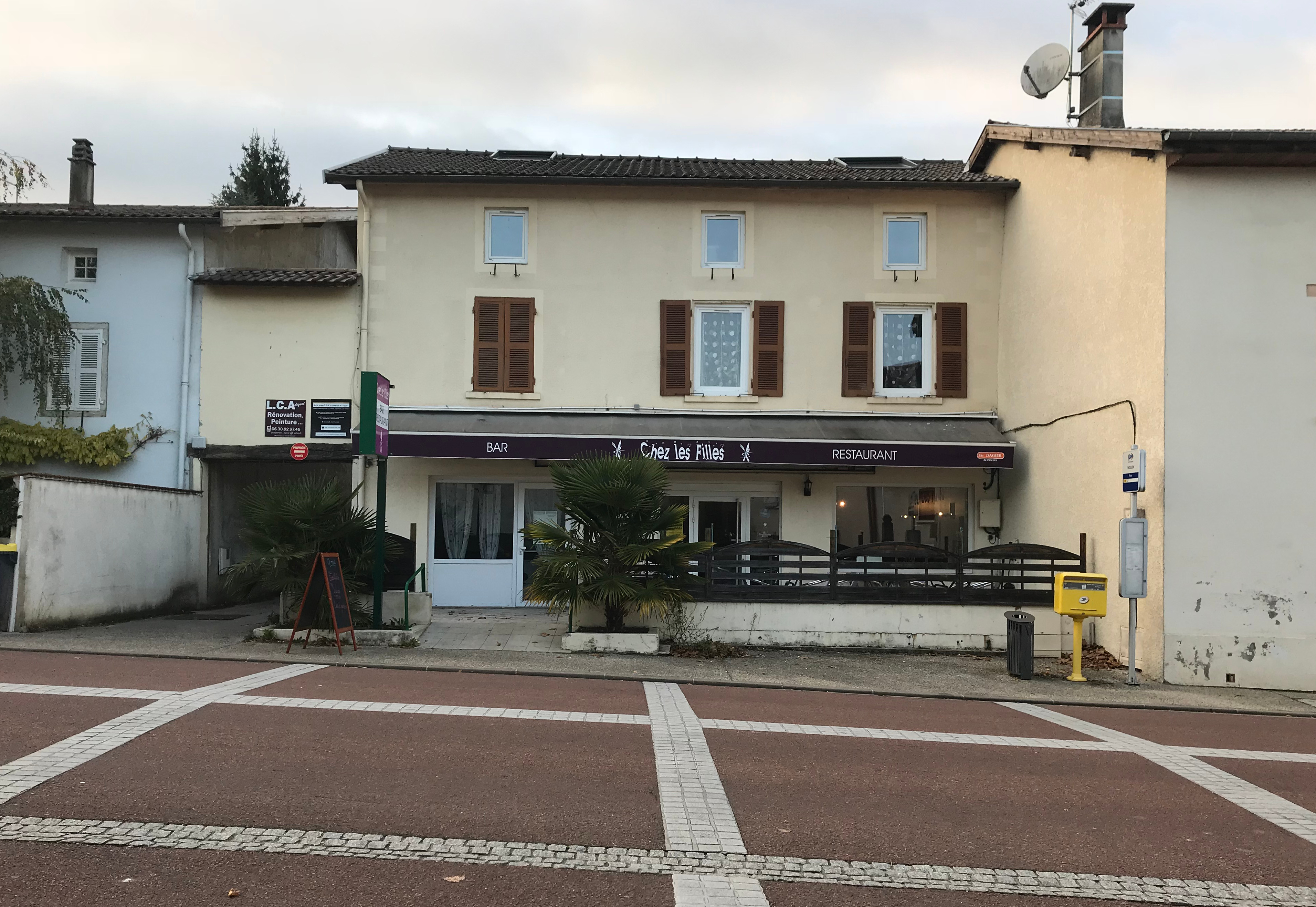 Mollon (Villieu-Loyes-Mollon, Ain, France).